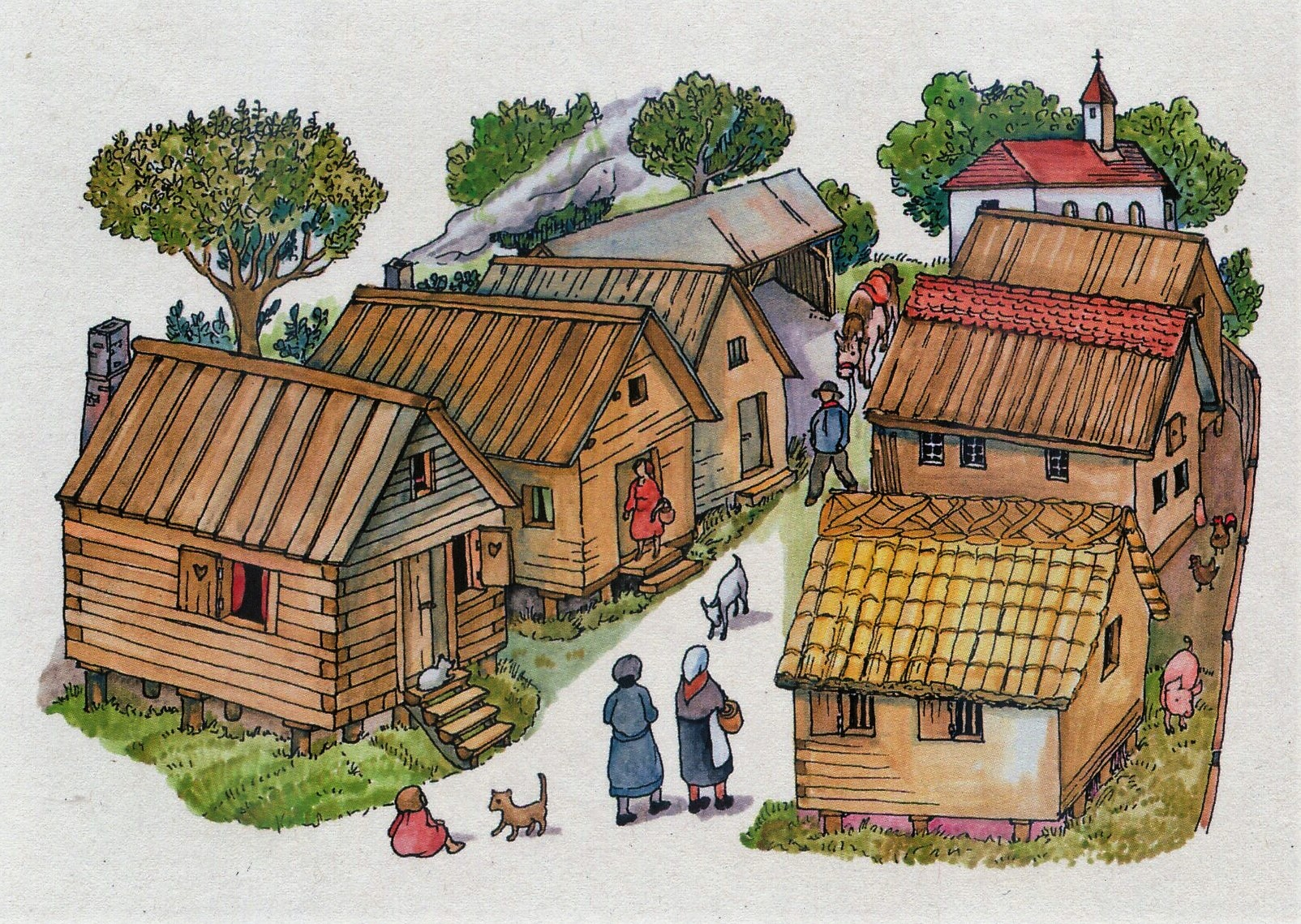 Küssaburg im Landkreis Waldshut in Baden-Württemberg. Historische Darstellung der Vorstadt der Burg im Mittelalter (14. bis 16. Jh.) Zeichnung von Wolf Pabst.